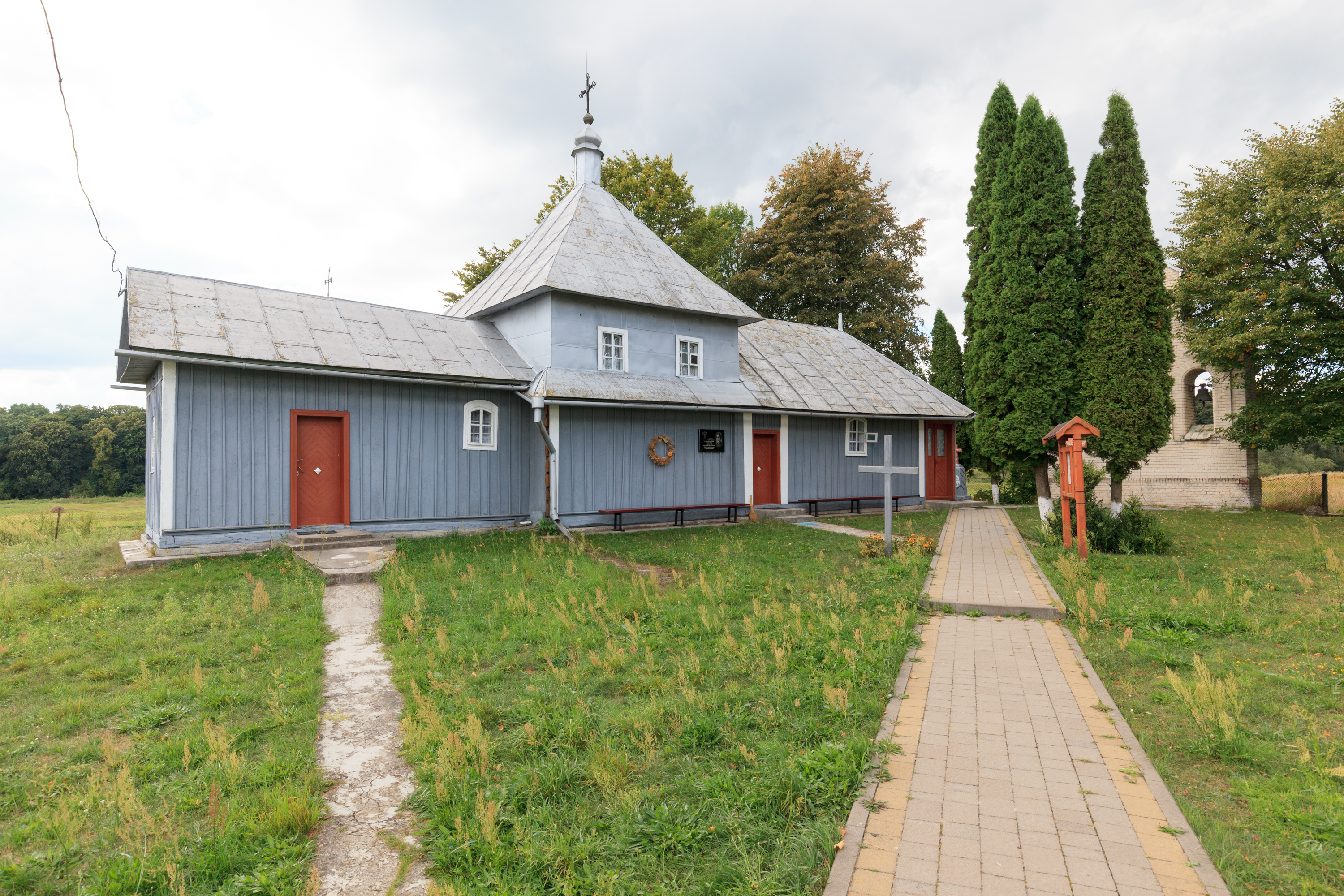 Церква Св. арх. Михаїла (дер.), Полоничі